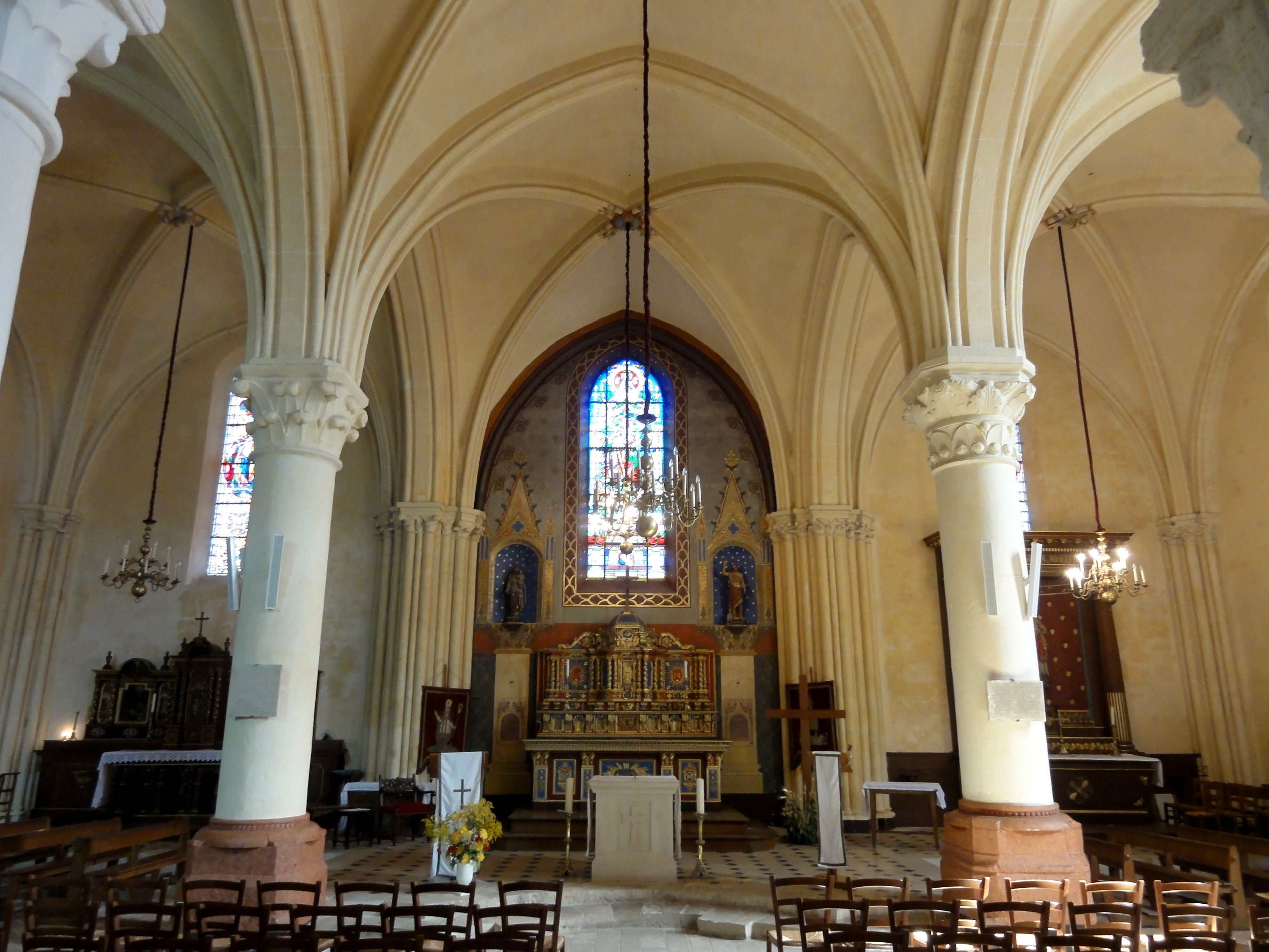 Vaisseau central, vue vers l'est.